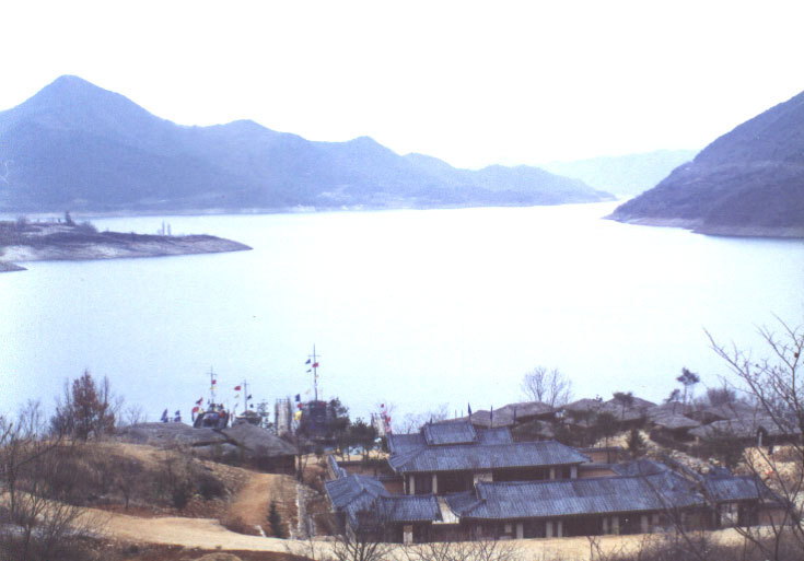 진흥왕이 청풍강 유역의 점령지를 순수한 하림궁에서 우륵이 하림조를 연주한 하림궁으로 비정하는 옛 청풍토성